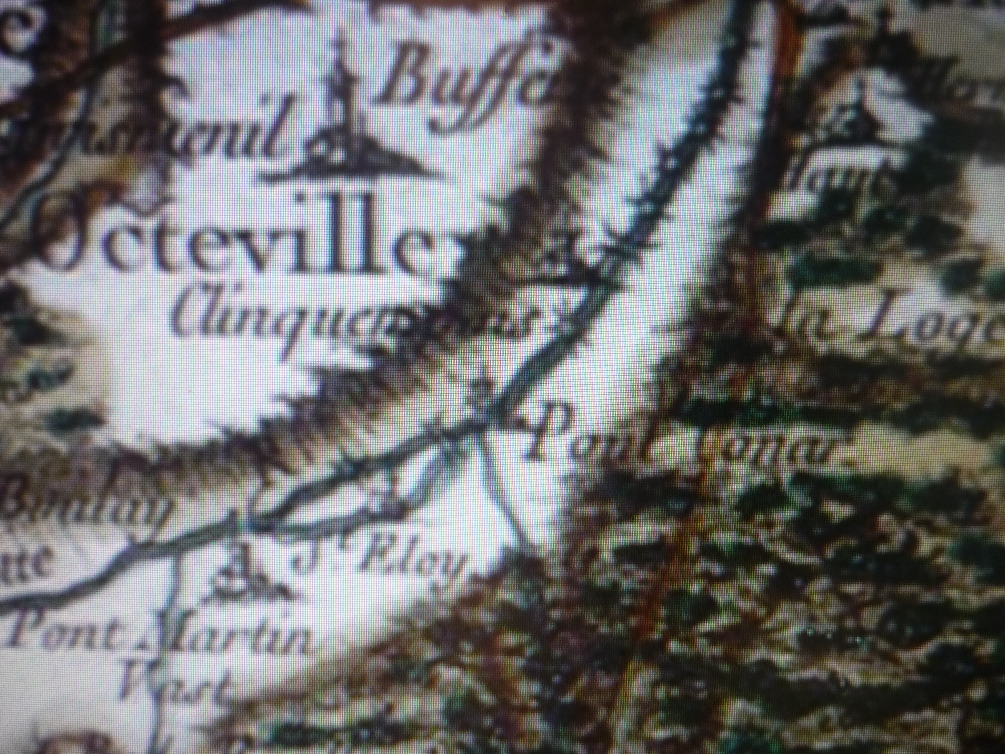 Le Pont Conard sur la carte de Cassini (près de Cherbourg).